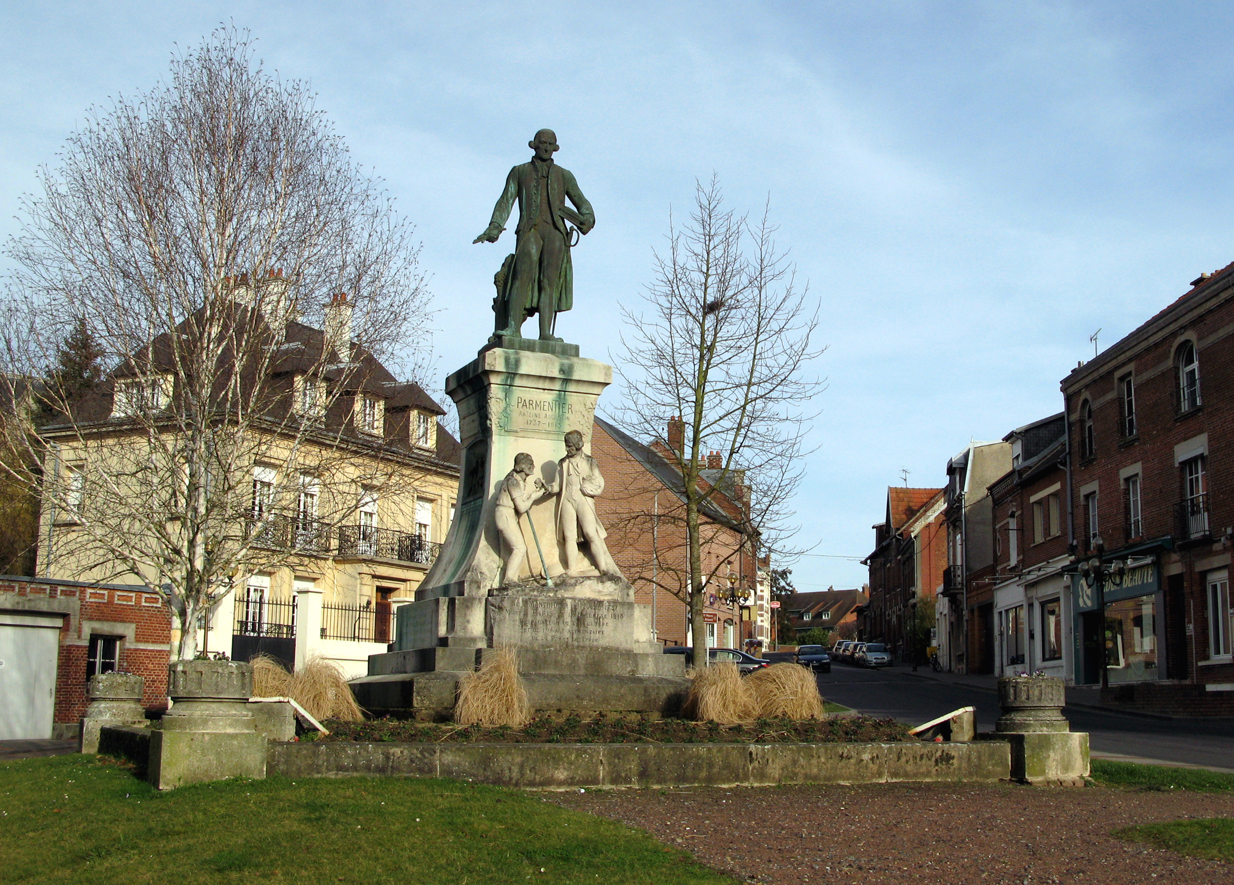 Montdidier (Somme, France) - Le monument de Parmentier, surmonté de la statue représentant le célèbre personnage. . .